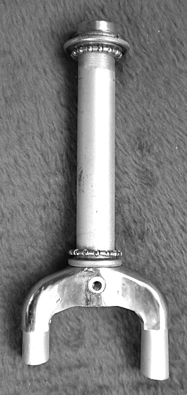 Steuersatz-aufbau